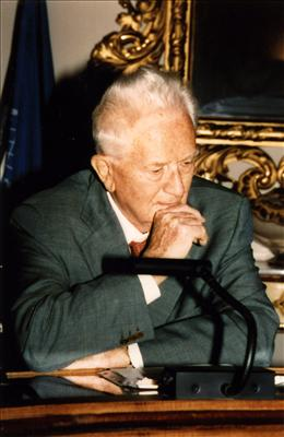 Prof. Aldo Berselli.